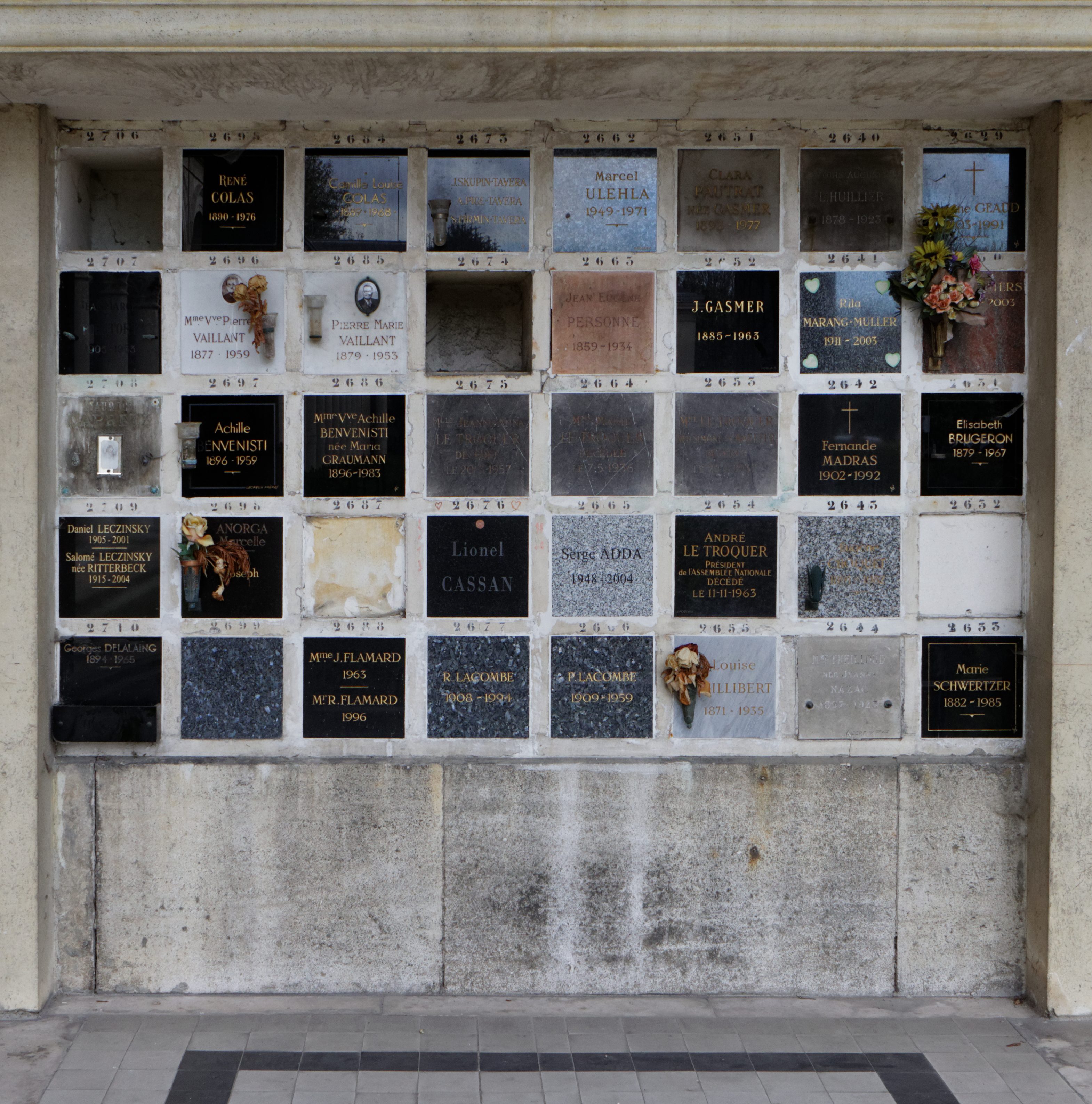 Cases du columbarium du cimetière du Père-Lachaise.